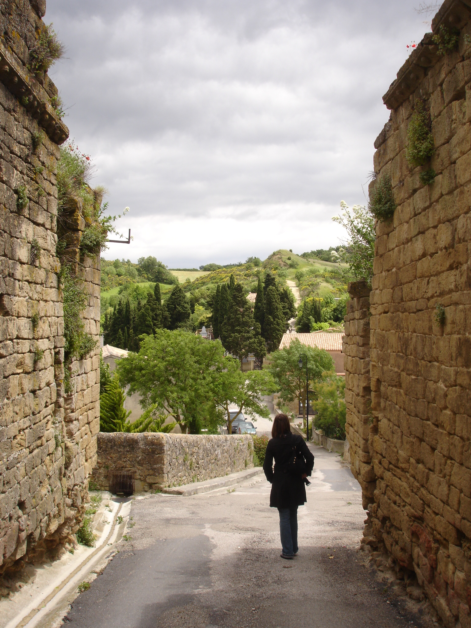 France, Aude (11), Laurac, porte des remparts